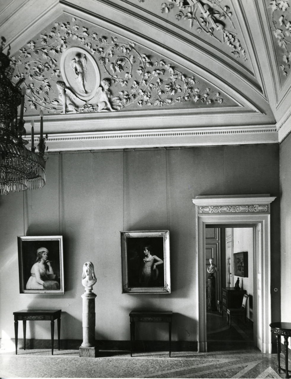 Servizio fotografico : Milano, 1970 / Paolo Monti. - Stampe: 8 : Positivo b/n, gelatina bromuro d'argento/ carta, 24x30. - ((Al verso delle stampe manoscritto i numeri di negativo corrispondenti: 16047, 16051, 16054, 16062, 16064. Sul coperchio della scatola, manoscritto a pennarello: "Milano monumenti". - Occasione: Documentaizone per la pubblicazione: TOURING CLUB ITALIANO, Milano, Milano, TCI, 1972 o Pier Fausto BAGATTI VALSECCHI, Giuseppe MAZZOTTI, Ville d'Italia, Milano, TCI, 1972